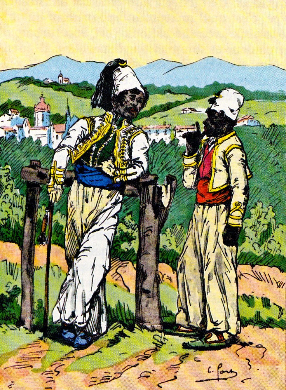 Officier indigène des mamelouks de la Garde impériale et son domestique noir en tenues de cantonnement.